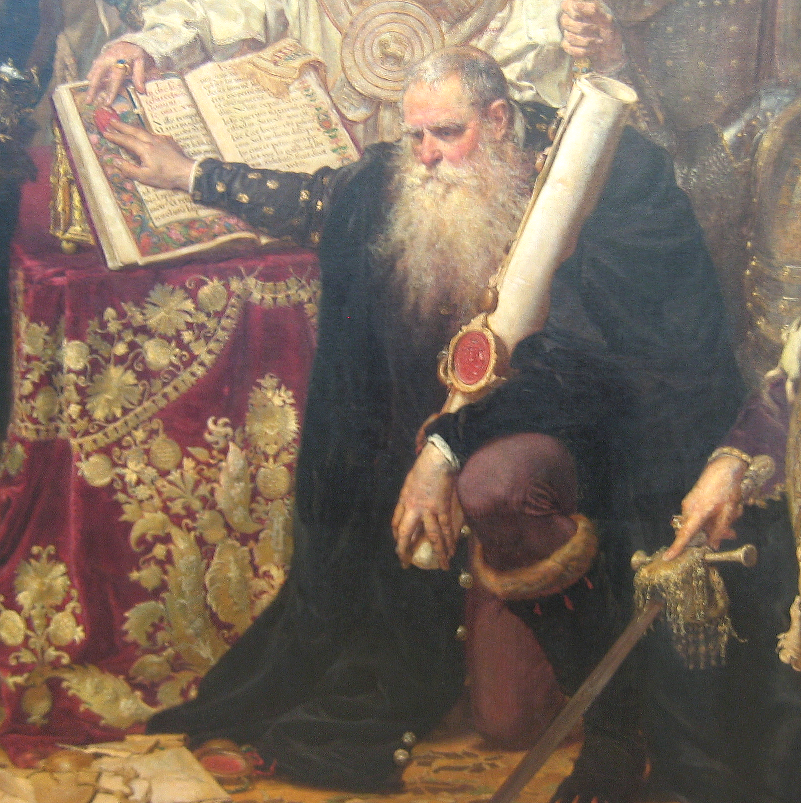 Marcin Zborowski, fragment of Unia Lubelska